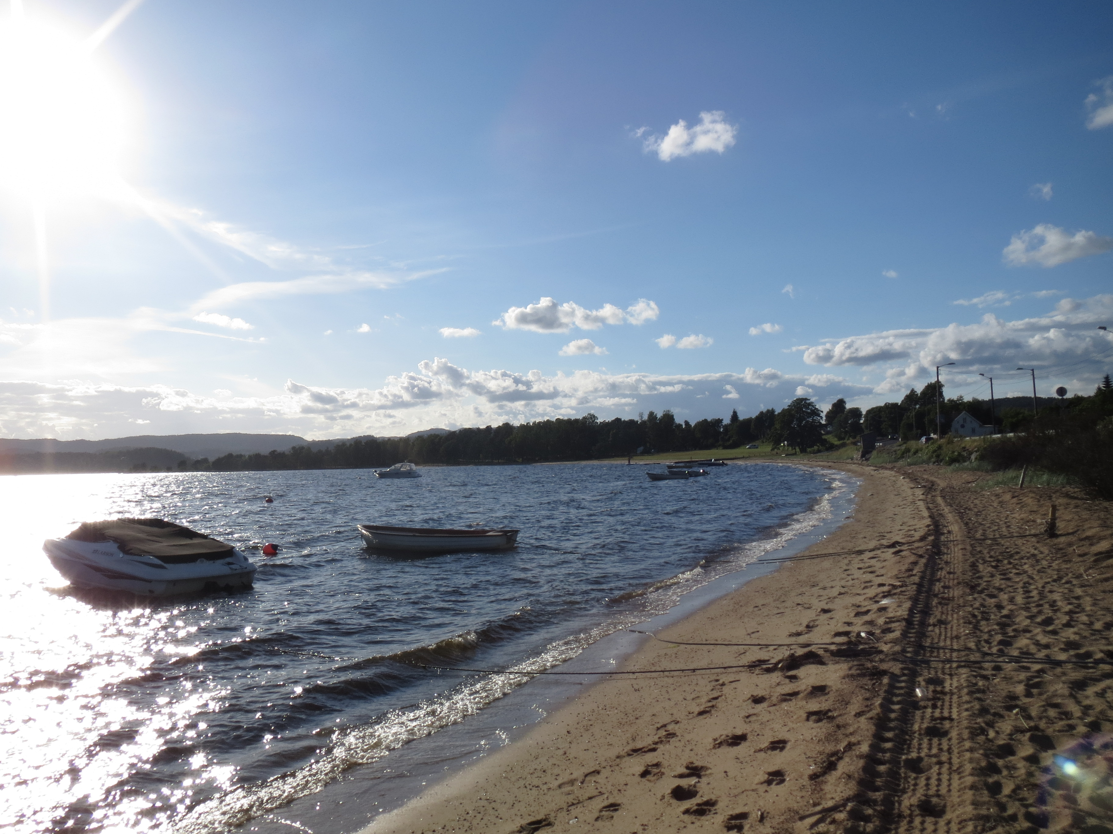 Hamresanden, ved Topdalsfjordeni Kristiansand